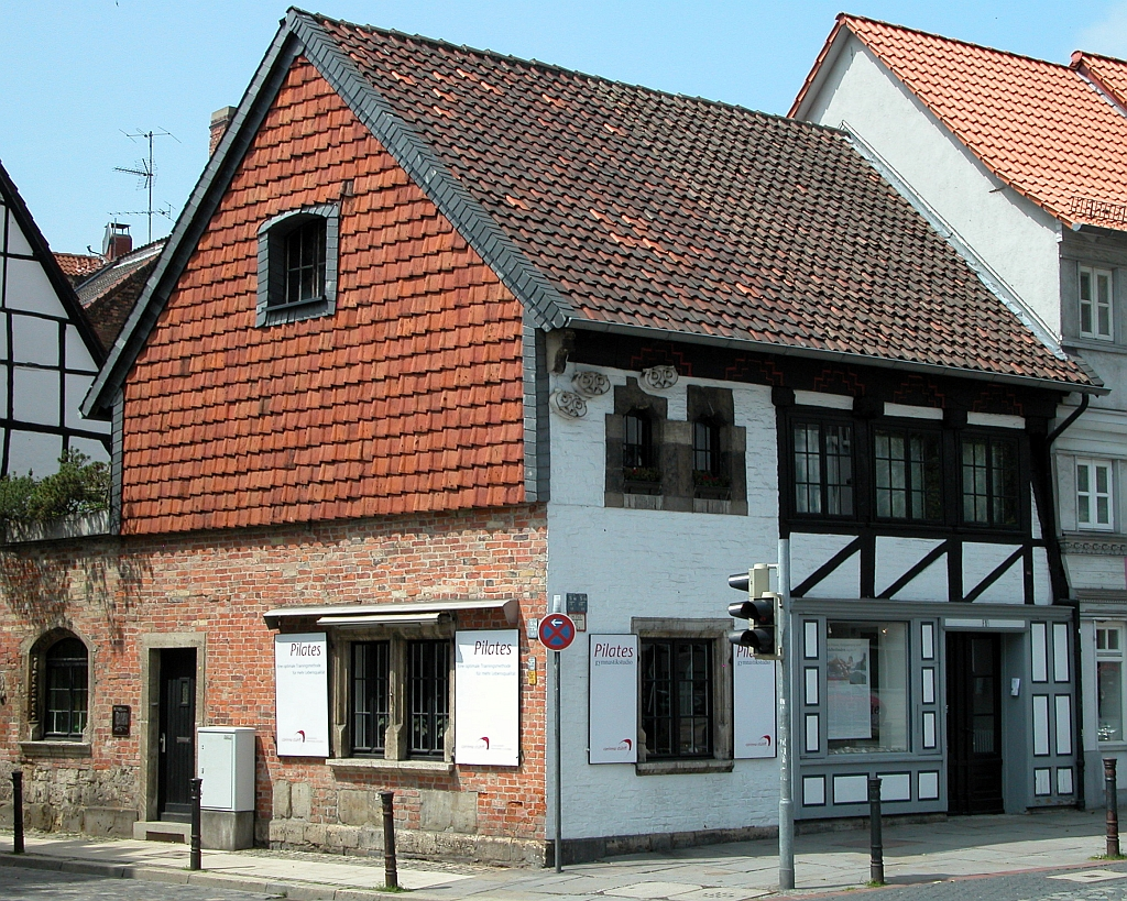 Braunschweig, Prinzenweg: Geburts- und Sterbehaus des Braunschweigischen Landeskonservators Kurt Seeleke.